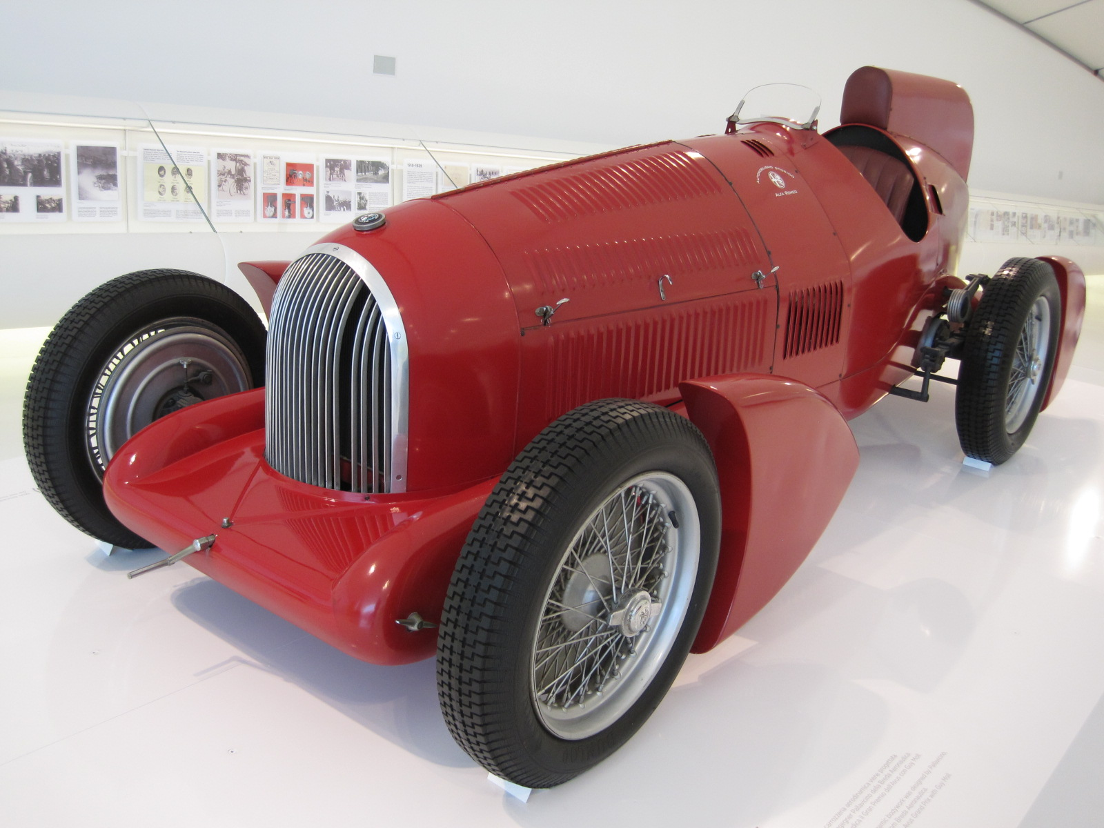 Automobiles in Enzo Ferrari Museum in Modène - Alfa Roméo Gran Premio Tipo B P3 - Aerodinamica - 8 cylindres